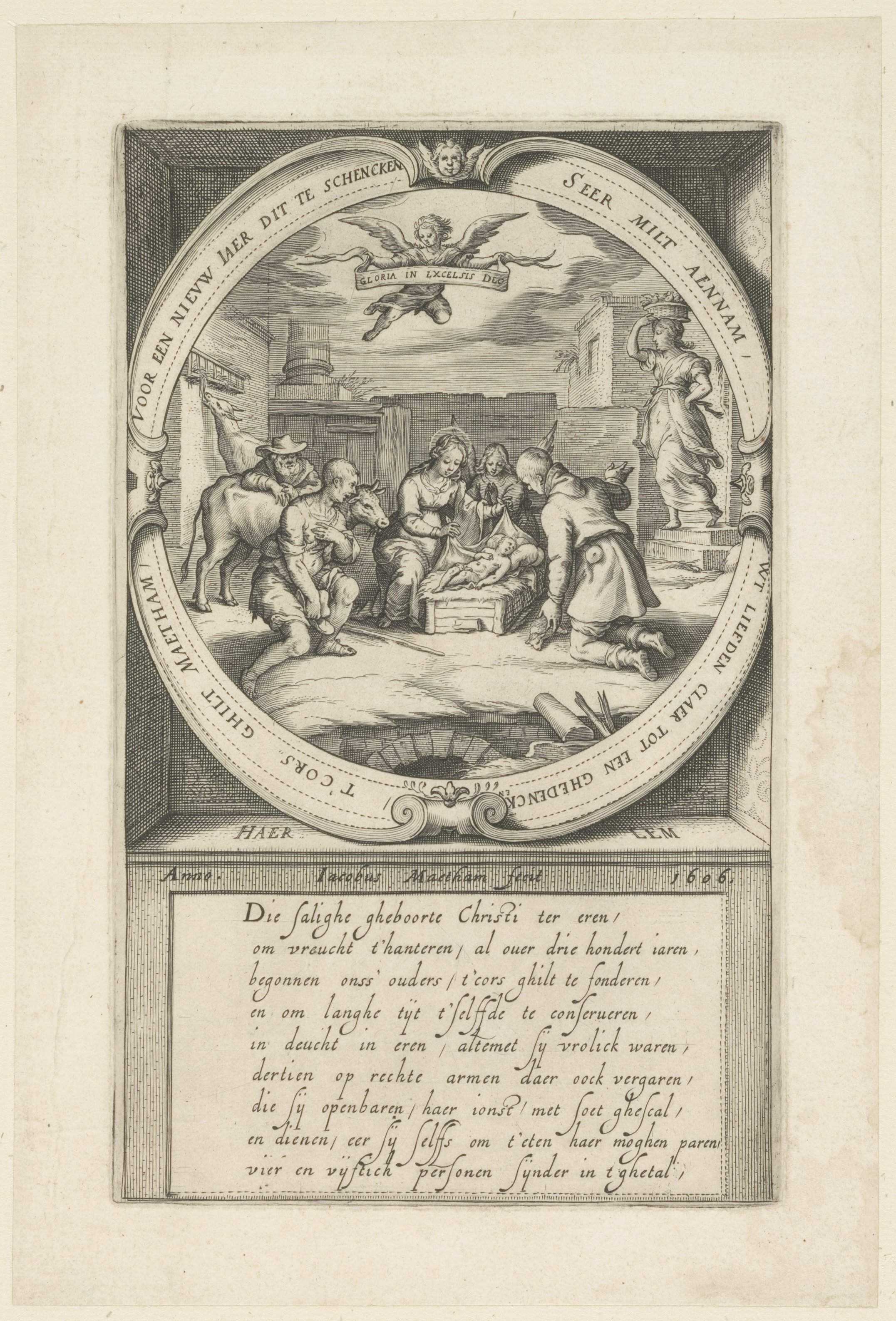 CollectieVoorhelm SchneevoogtInventarisnummerNL-HlmNHA_53010809BeschrijvingGeboorte van JezusAanbidding der herders van de pas geboren Jezus Christus. Kopergravure van Jacob Matham (1571-1631) Gesigneerd en gedateerd onder de afbeelding: "Anno Iacobus Maetham fecit 1606".Met 9-regelig Hollands gedicht, waarin de doelstellingen van het Gilde.FotonummerNL-HlmNHA_53010809DocumenttypeHistorieprenten, tekeningen en foto'sVervaardigerMatham, Jacob (1571-1631) Soort vervaardigerGraveur Annotaties1e staat; niet bij Bartsch/Weigel 315. Herkomst: legaat C.G.Voorhelm Schneevoogt, 1877. (zie Catalogus der platen van Haarlemsche Graveurs benevens de prijzen daarvoor besteed bijeenverzameld door C.G.V.Schneevoogt blz.46 nr.315: "l'adoration des bergers f 1,25". De prent is een Nieuwjaarsprent van het Heilig Kerstmisgilde te Haarlem, gemaakt in 1606 door Jacob Matham en door hem aan het gilde geschonken (incl. de koperplaat, die nog steeds wordt bewaard bij het archief van het gilde). De ontwerptekening wordt bewaard in het Rijksprentenkabinet, gesigneerd en gedateerd: IM 1606. Oud archiefnummer VS XIII, 55.LandNederland ProvincieNoord-Holland GemeenteHaarlem PlaatsHaarlem, Bethlehem Begindatum1606Einddatum1606Afmeting hoogte (cm)22Afmeting breedte (cm)13,5Trefwoordenengel, herders, Jezus Christus, Jozef, Maria, kerstmis, Bijbelse taferelen LiteratuurHollstein Dutch 33